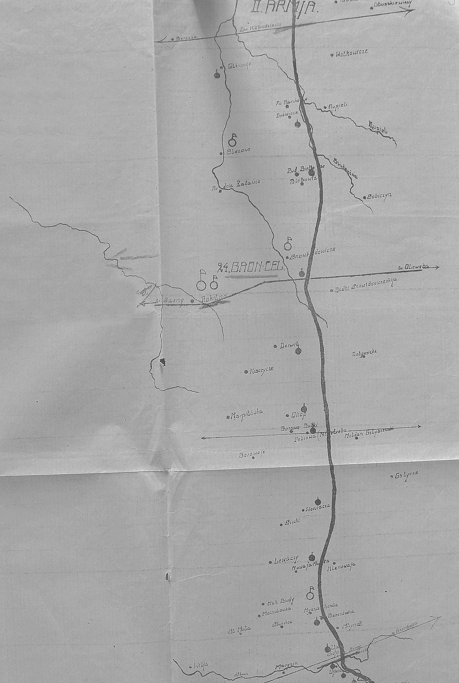 Szkic rozmieszczenia 24 batalionu celnego